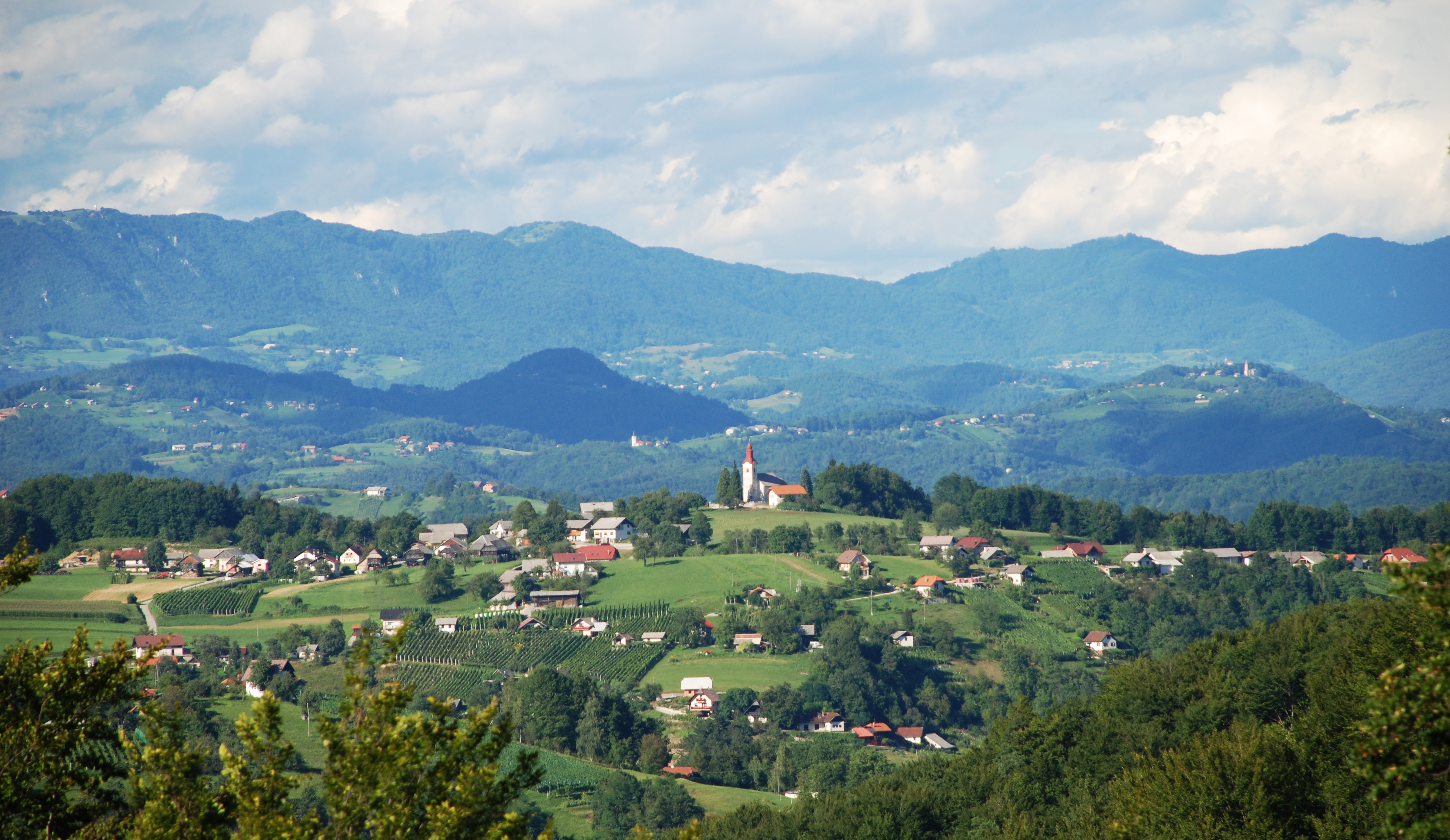 Sveti Vrh, naselje nad Mokronogom.